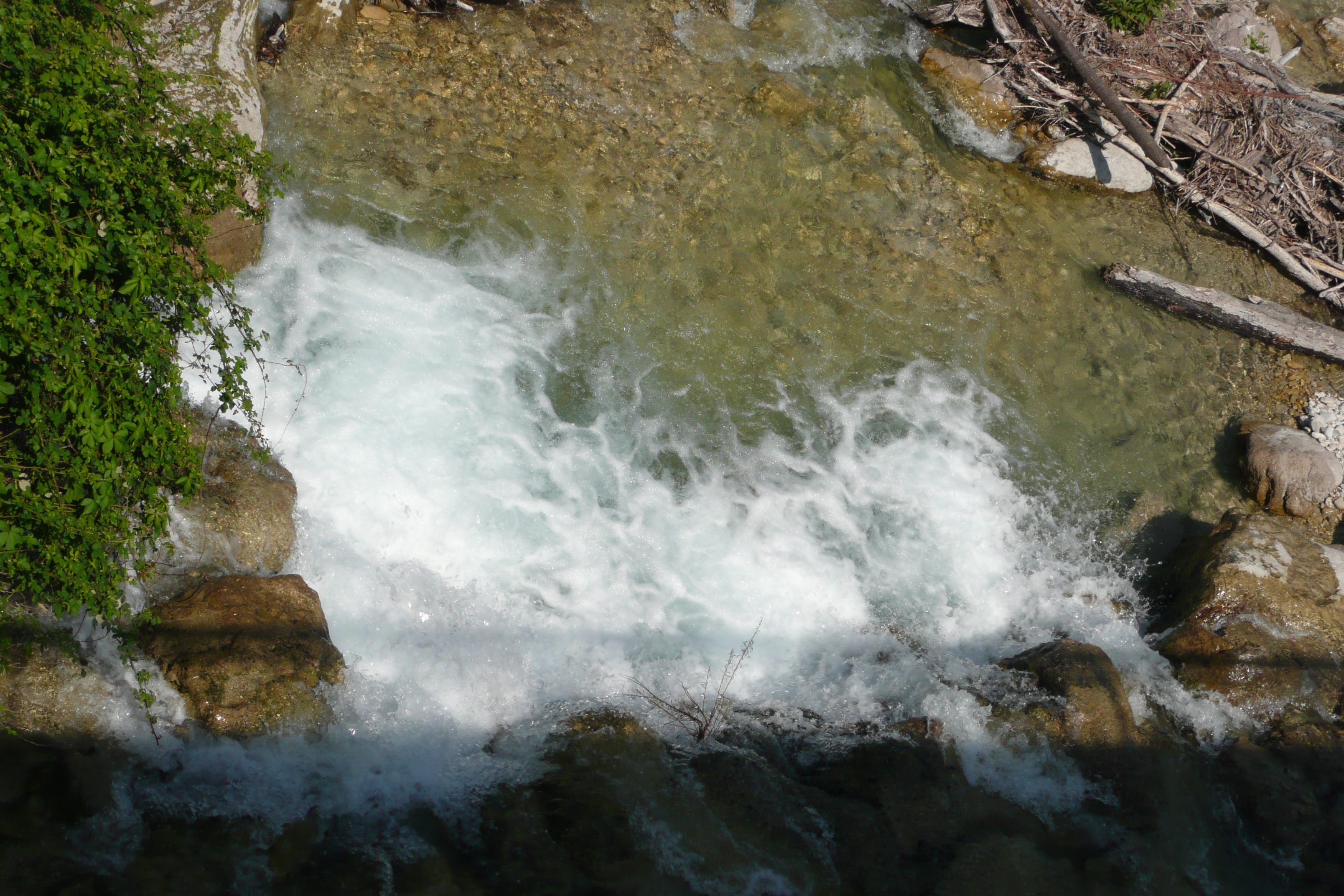 Chute d'eau du Toulourenc près de Mollans-sur-Ouvèze.